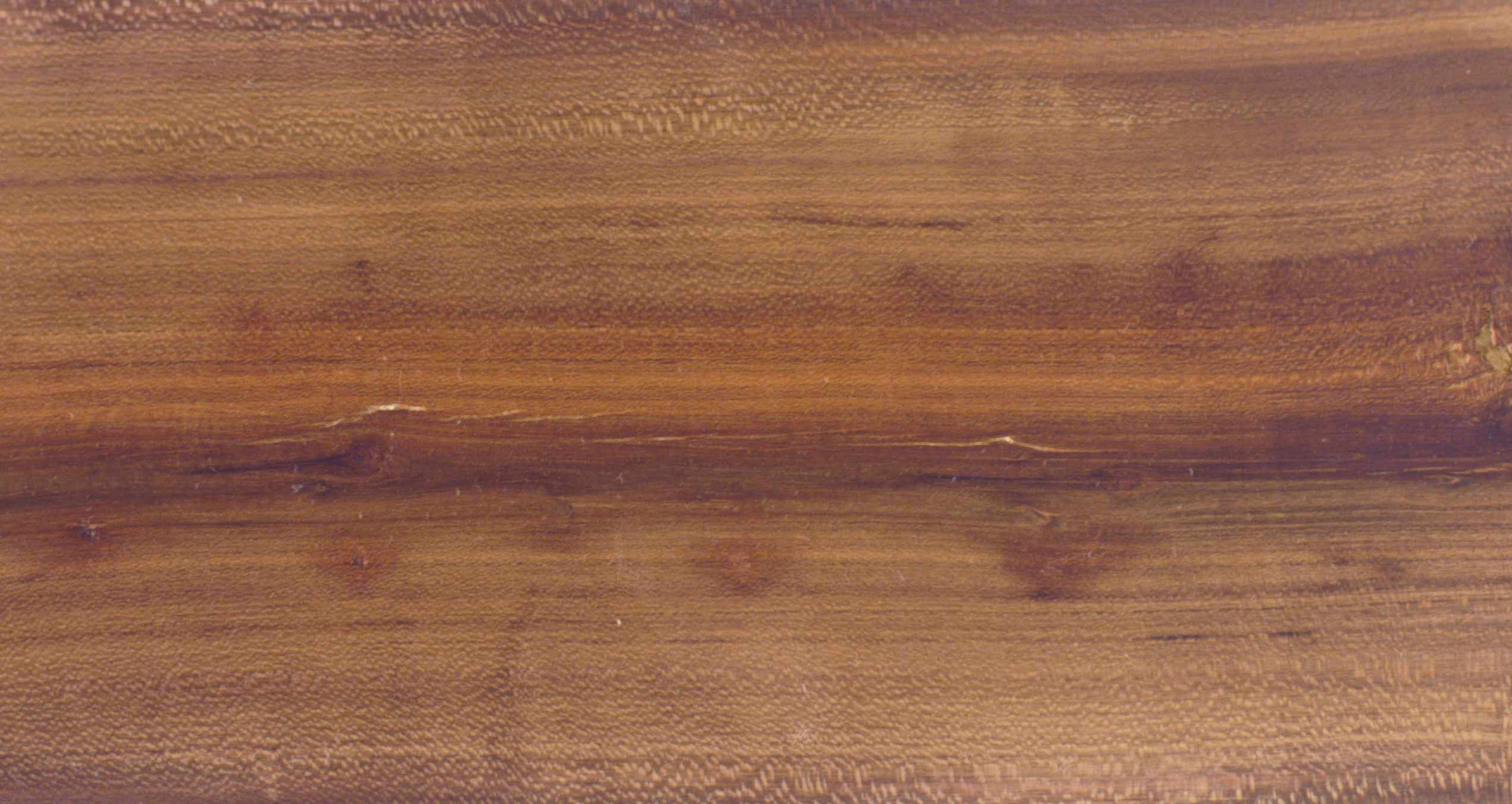 Photo vom Pflaumenholz Brett ca. 13x25 cm, leicht geschliffen und geölt